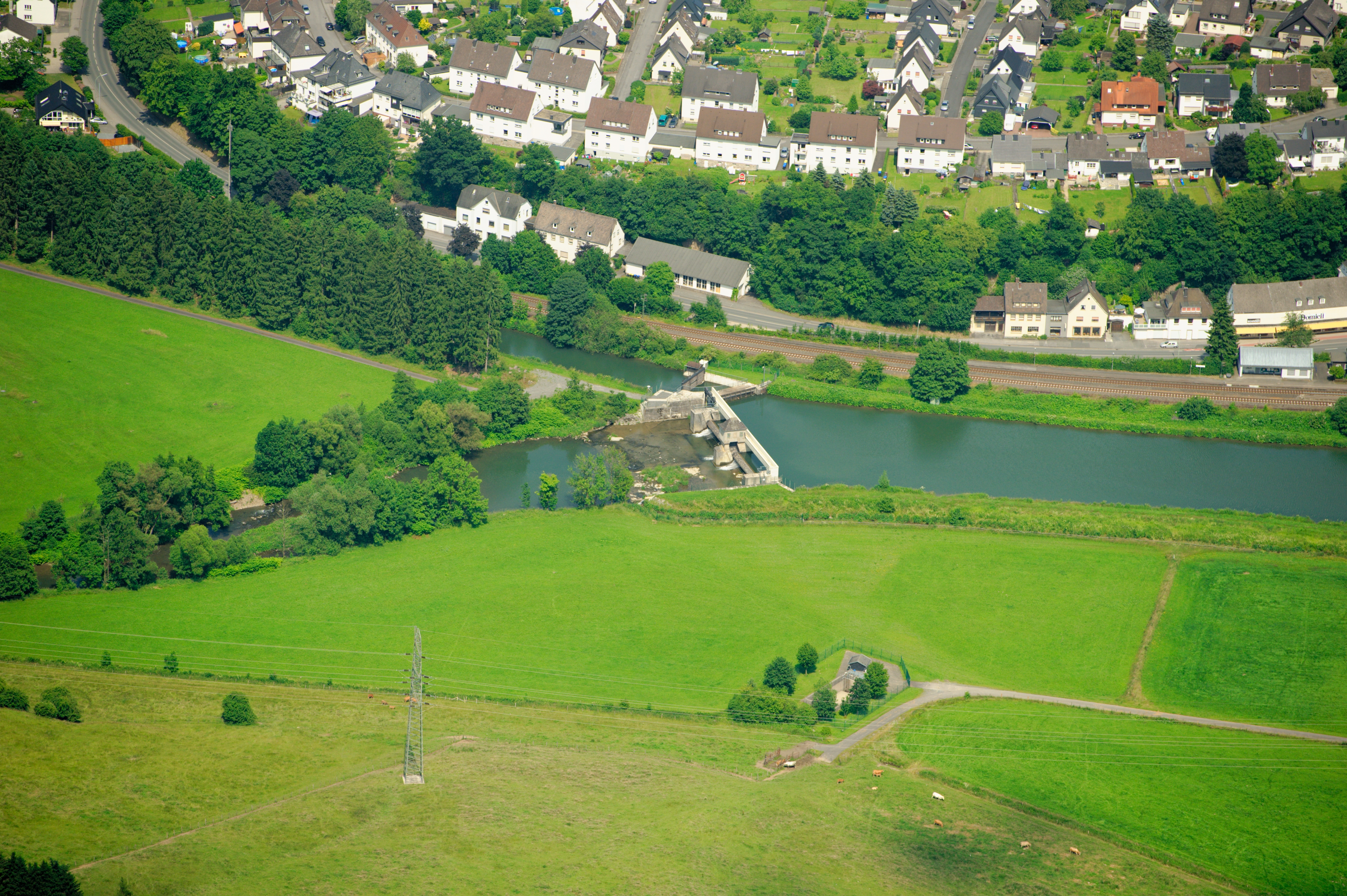 Fotoflug Sauerland-Ost - Ruhrwehr bei Freienohl, Meschede, westlich des Bahnhofs; links Obergraben und Ruhr (NSG) The making of this document was supported by the Community-Budget of Wikimedia Germany.